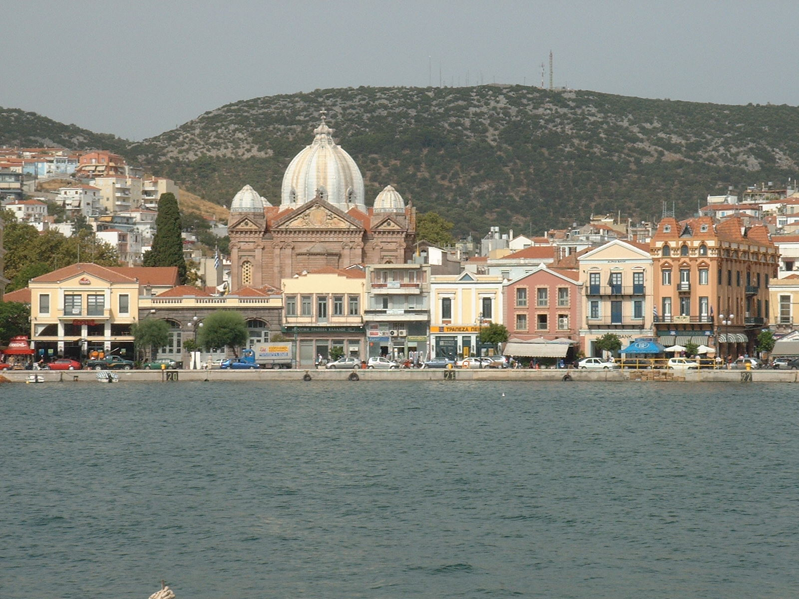 Port de Mytilène : eglise Agios Therapondas (Saint guérisseur)